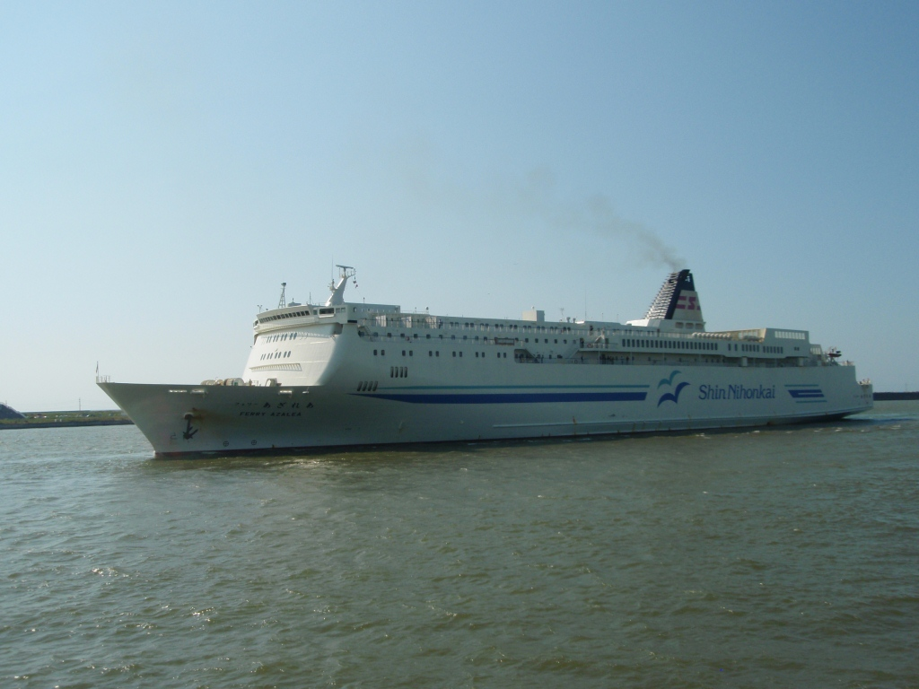 フェリー あざれあ（２０１１年７月） 新潟西港入港直前に山の下埠頭岸壁より撮影